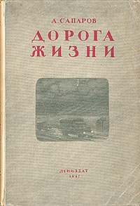 Документальная повесть Арифа Сапарова "Дорога жизни" посвящена блокаде Ленинграда